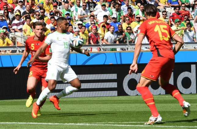 Belgium tries to reclaim the ball after an interception by top Algeria scorer El Arbi Hillel Soudani. بلجيكا تحاول استعادة الكرة بعد قطعها من قبل كبير هدافي الجزائر العربي هلال سوداني. La Belgique tente de reprendre le contrôle du ballon après une interception par le meilleur buteur algérien, El Arbi Hillel Soudani.